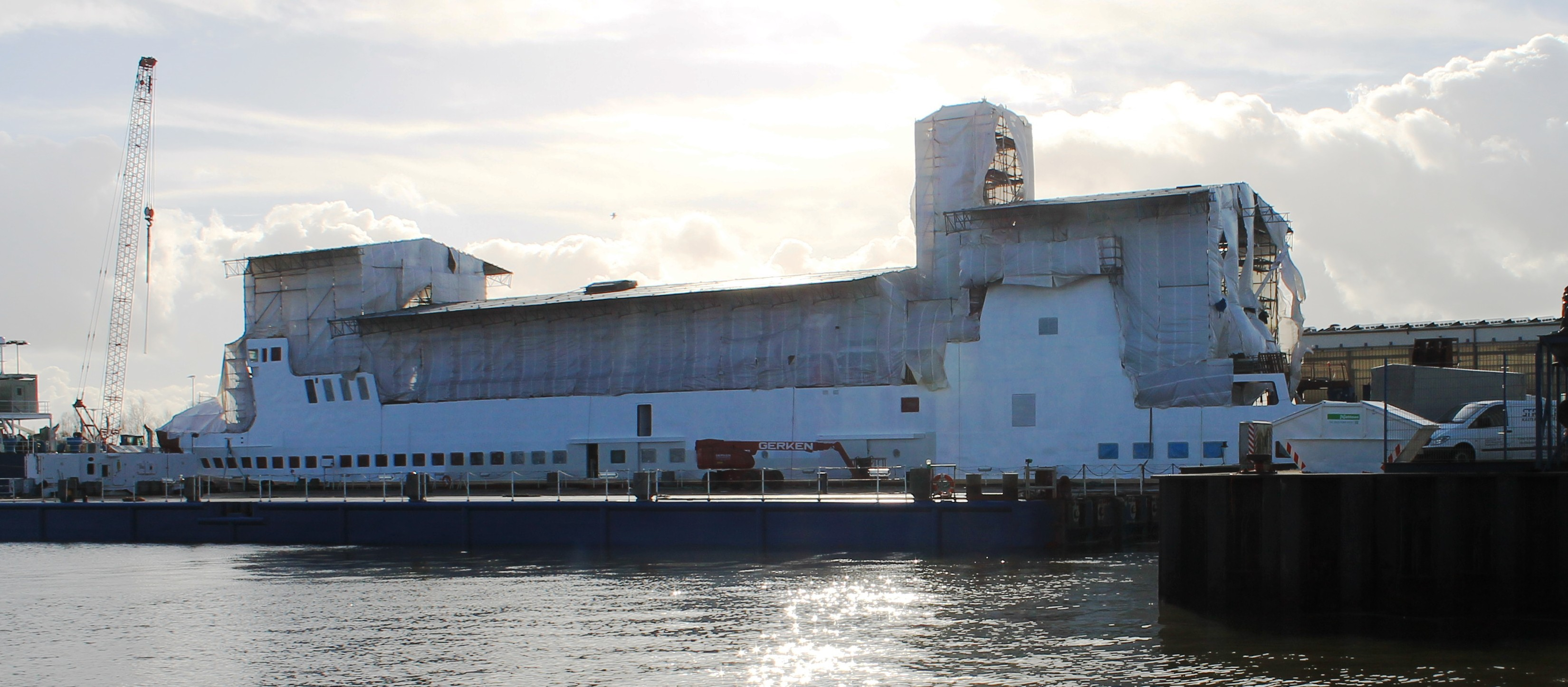 Die Ostfriesland in Bremerhaven mit dem neuen Hinterschiff, dass die neuen LNG-Elemente enthält